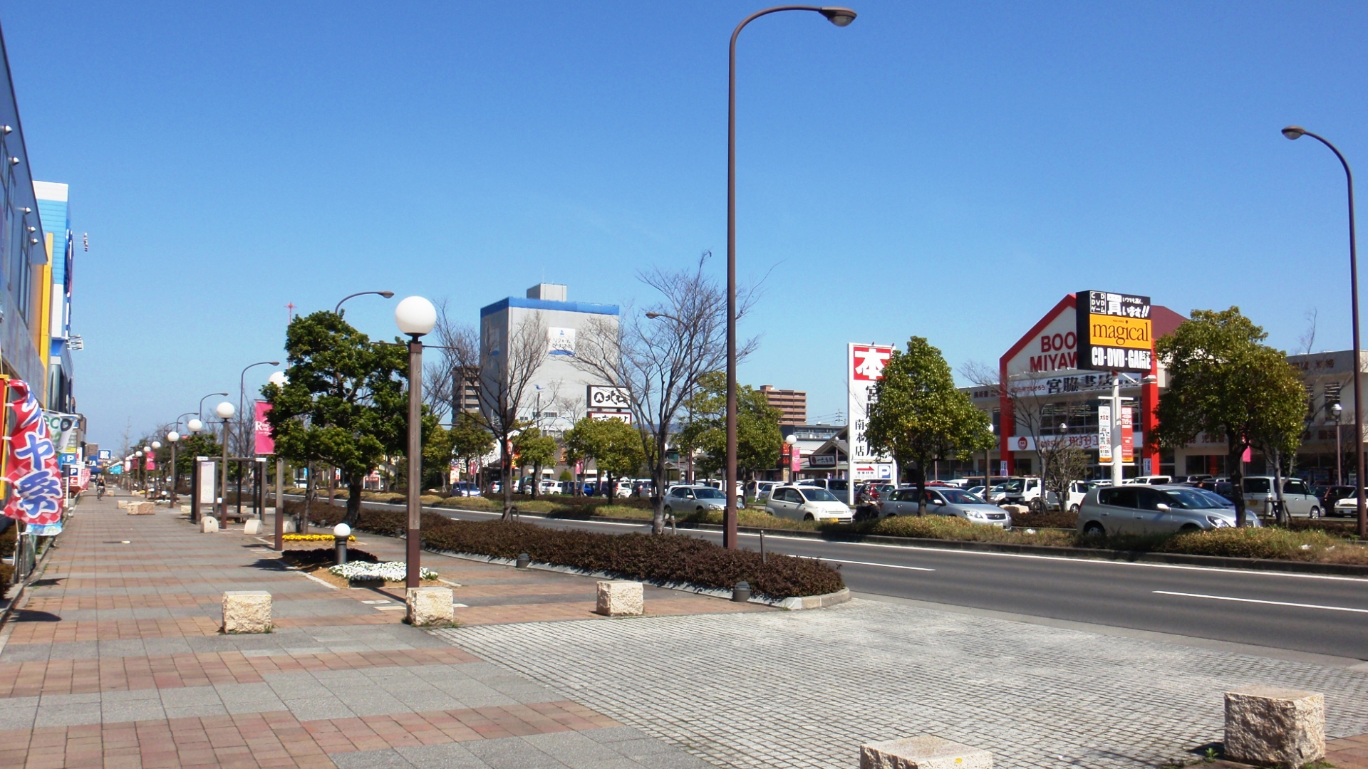 香川県高松市にあるレインボーロードの沿線風景。